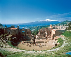 Teatro Greco Taormina